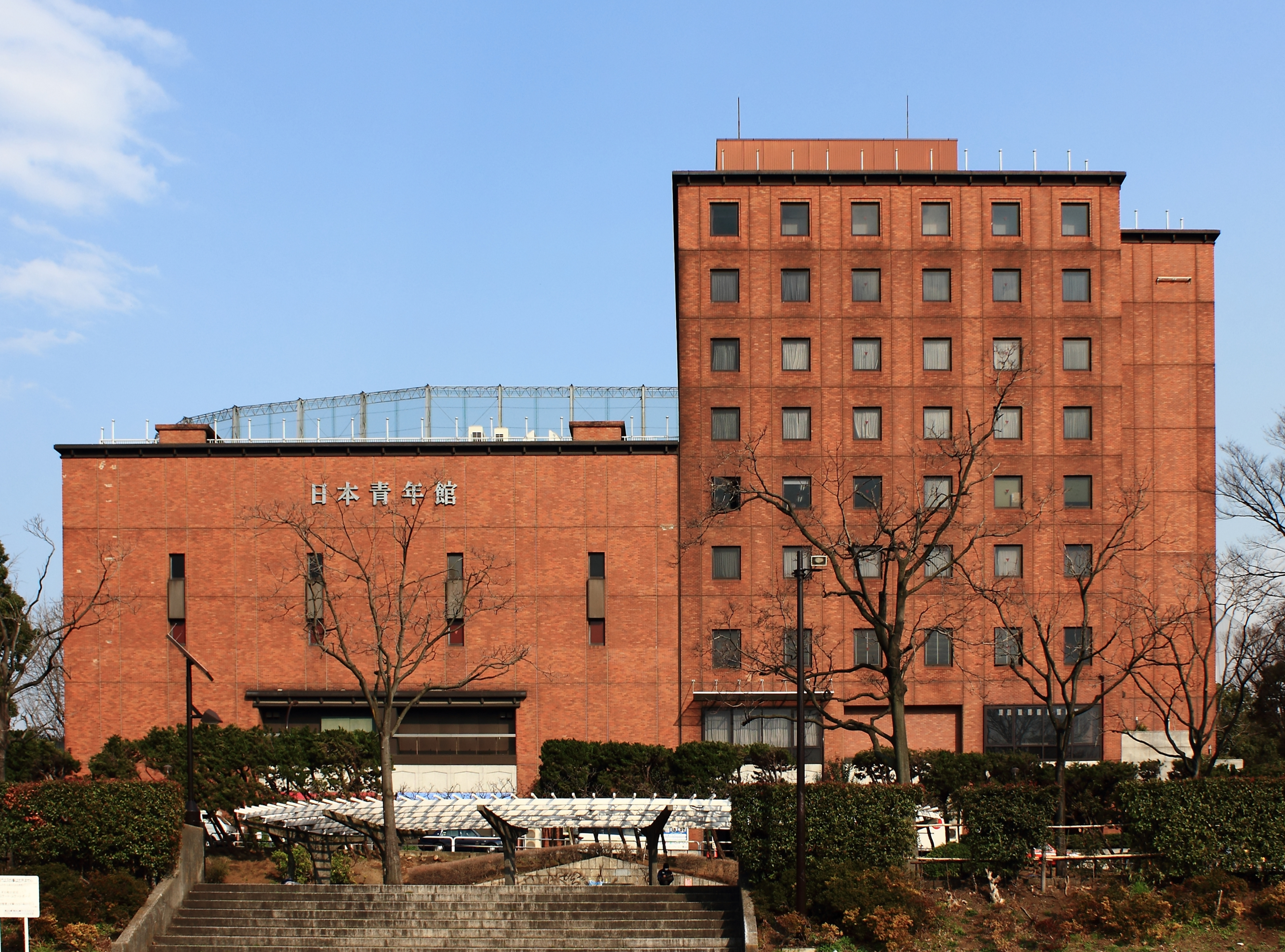 日本青年館（東京都新宿区）